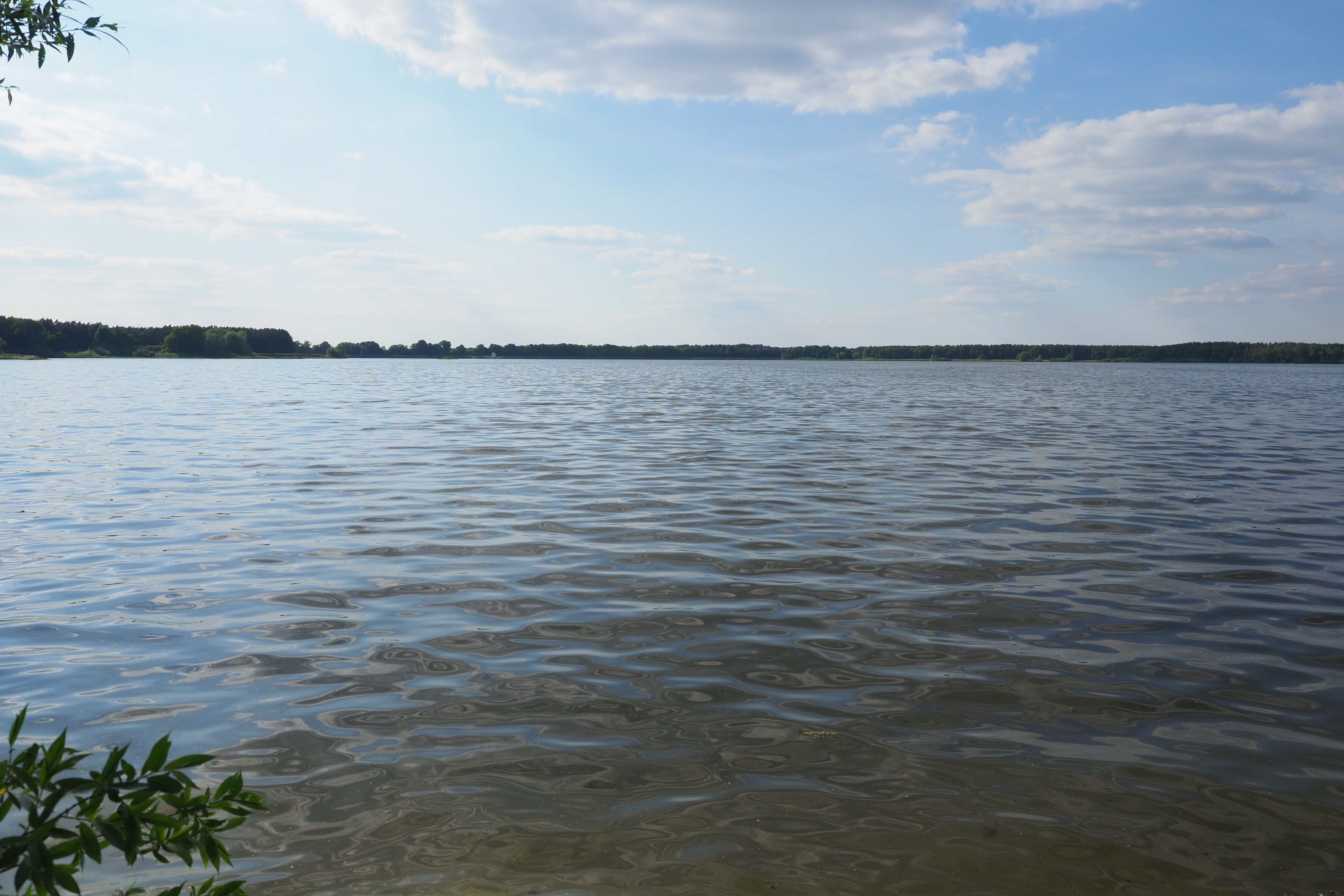 Großteich im Naturschutzgebiet Zschornaer Teichlandschaft